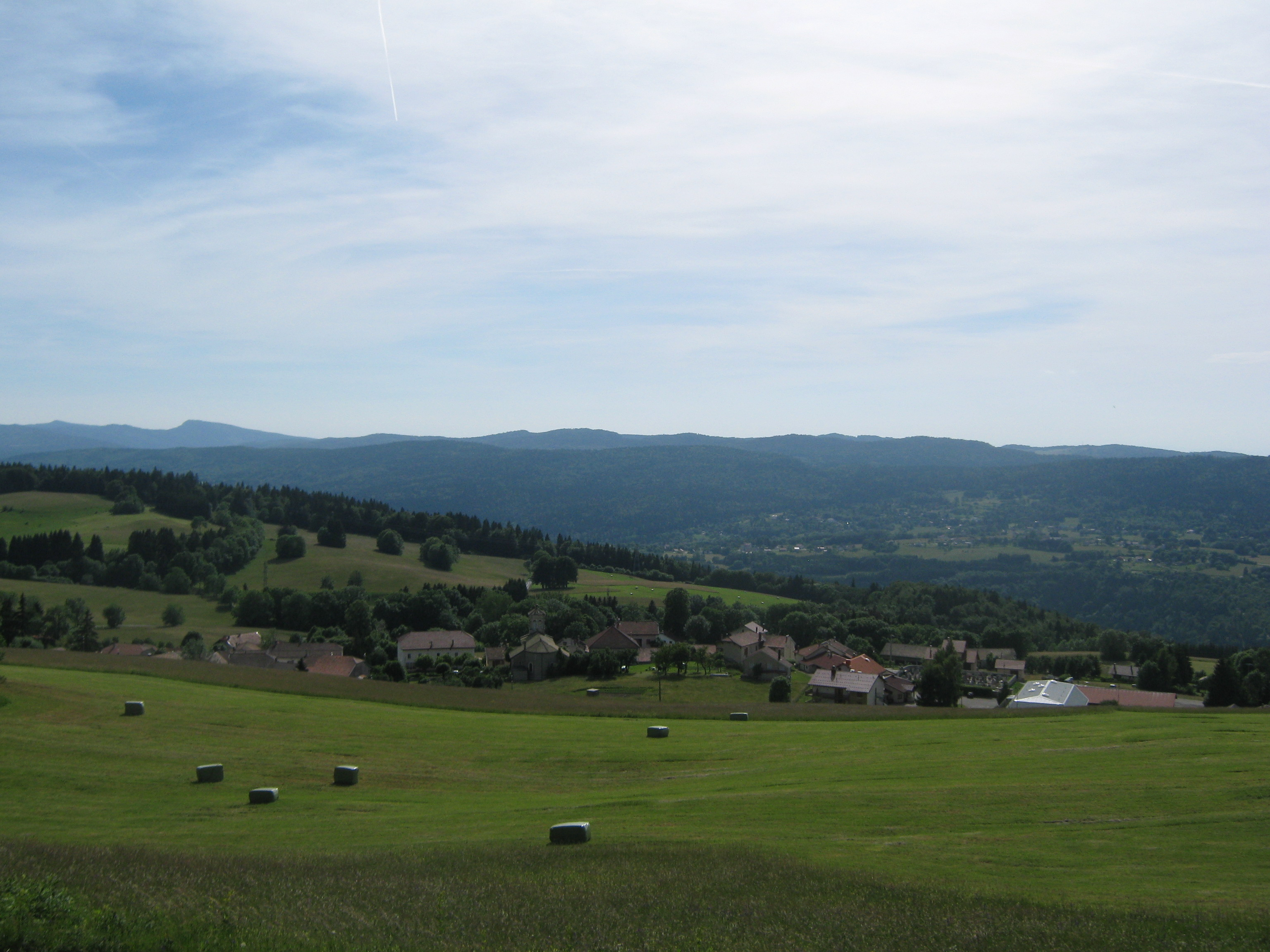 Vue d'ensemble du village de Giron